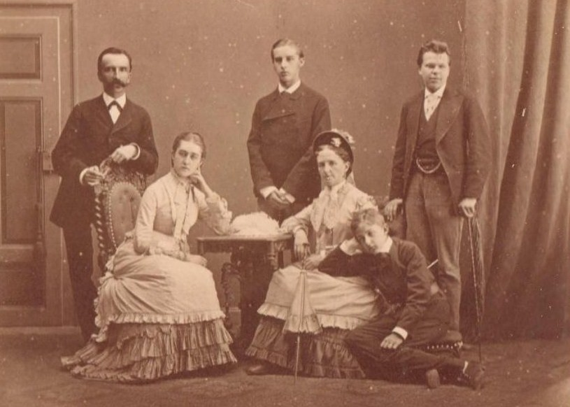 Александр Николаевич Ламздорф с детьми и сестрой Марией Николаевной Ламздорф.